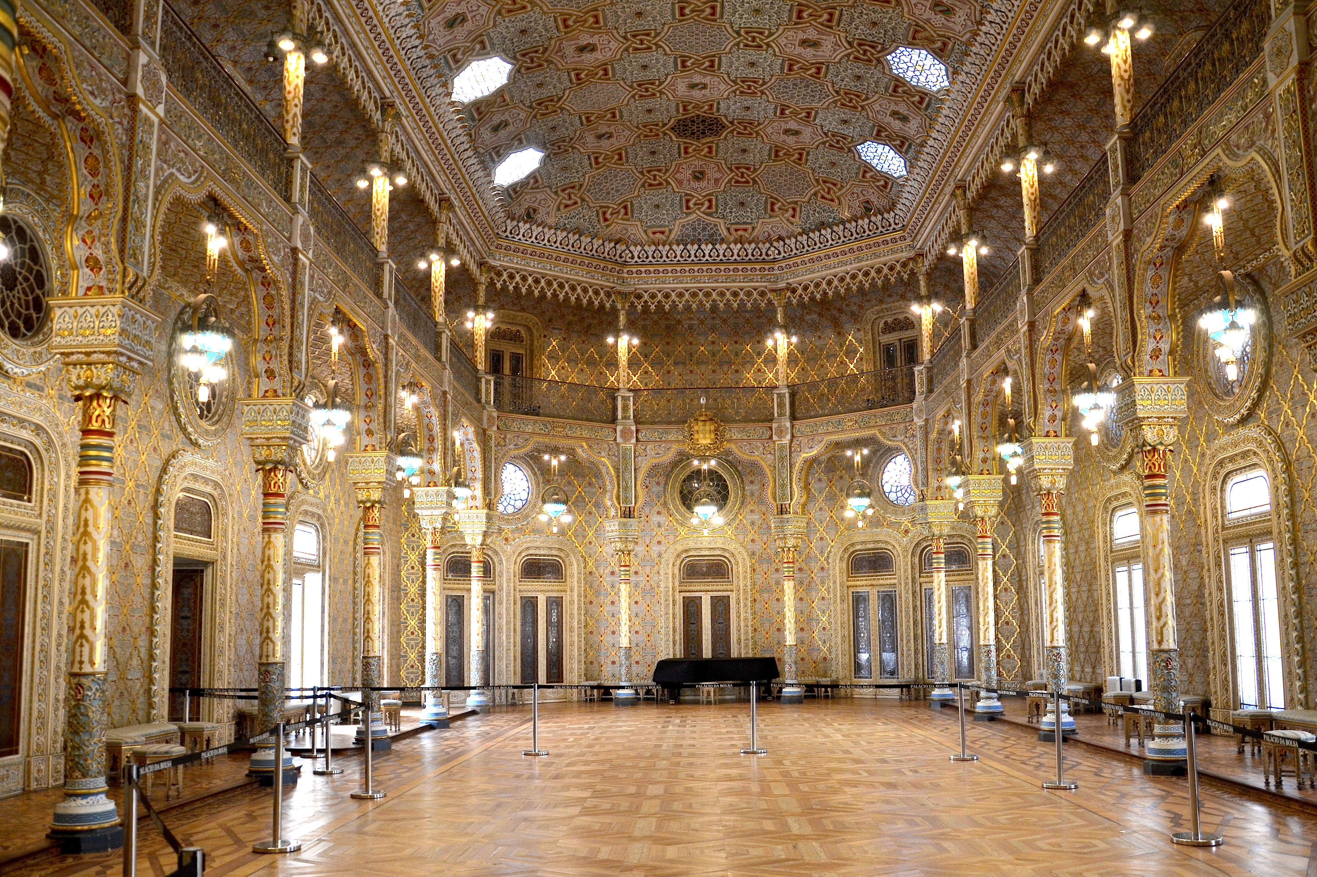 Palacio da Bolsa Tags: portugal porto oporto portogallo